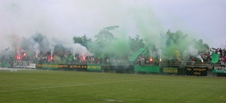 Tifosi del Bitonto in festa per la promozione in Serie D nel maggio 2003